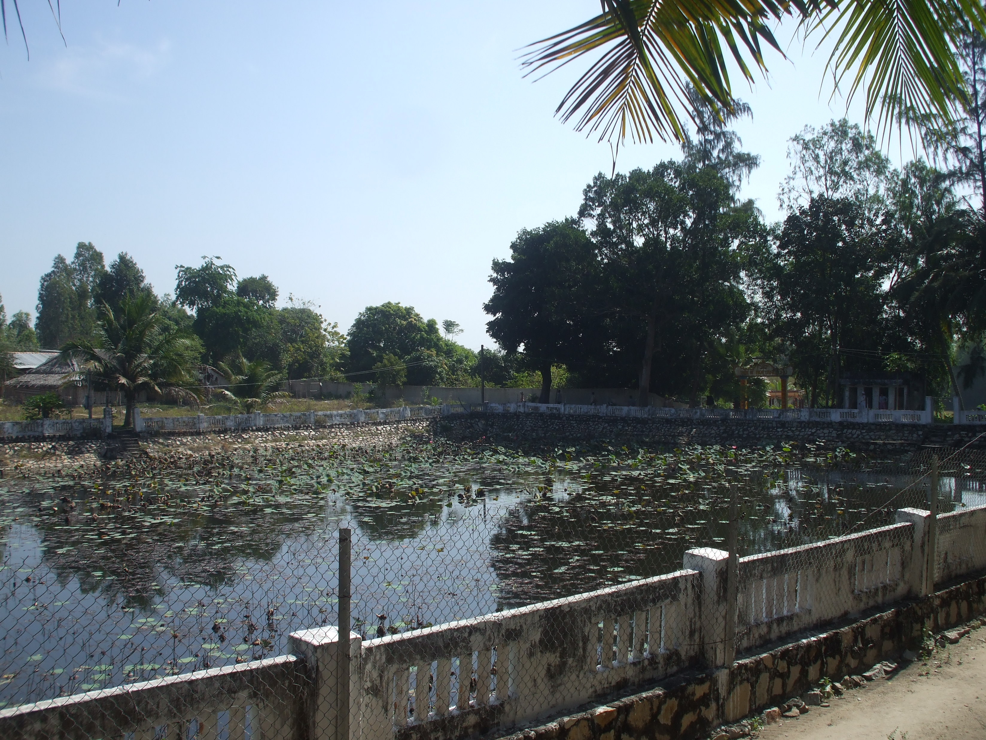 Ao rộng trước đình Thới Sơn (Tịnh Biên, An Giang). Tương truyền khi xưa là nơi ông Đình Tây lén nuôi con sấu năm chân hung dữ.